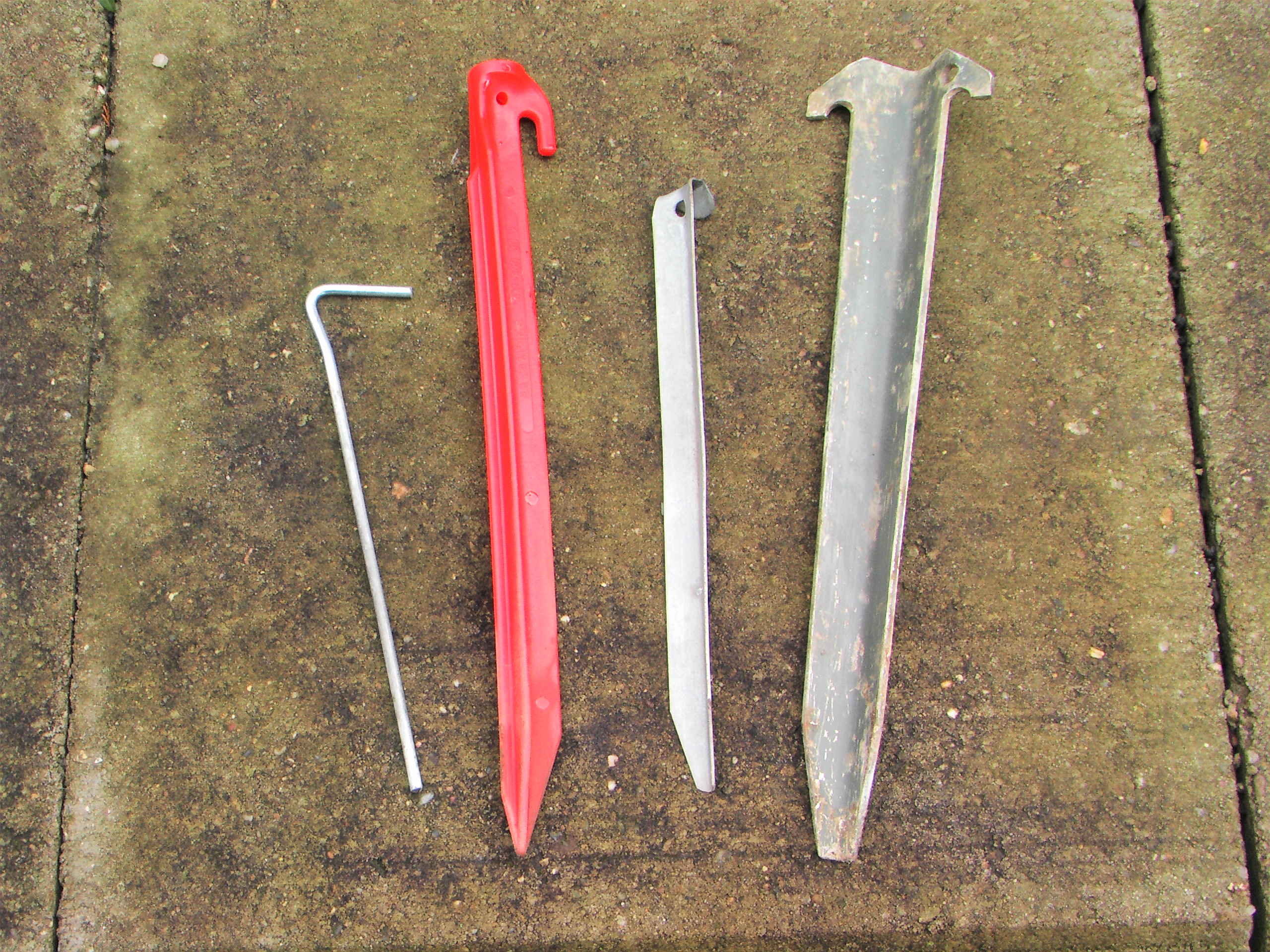 mehrere Heringe